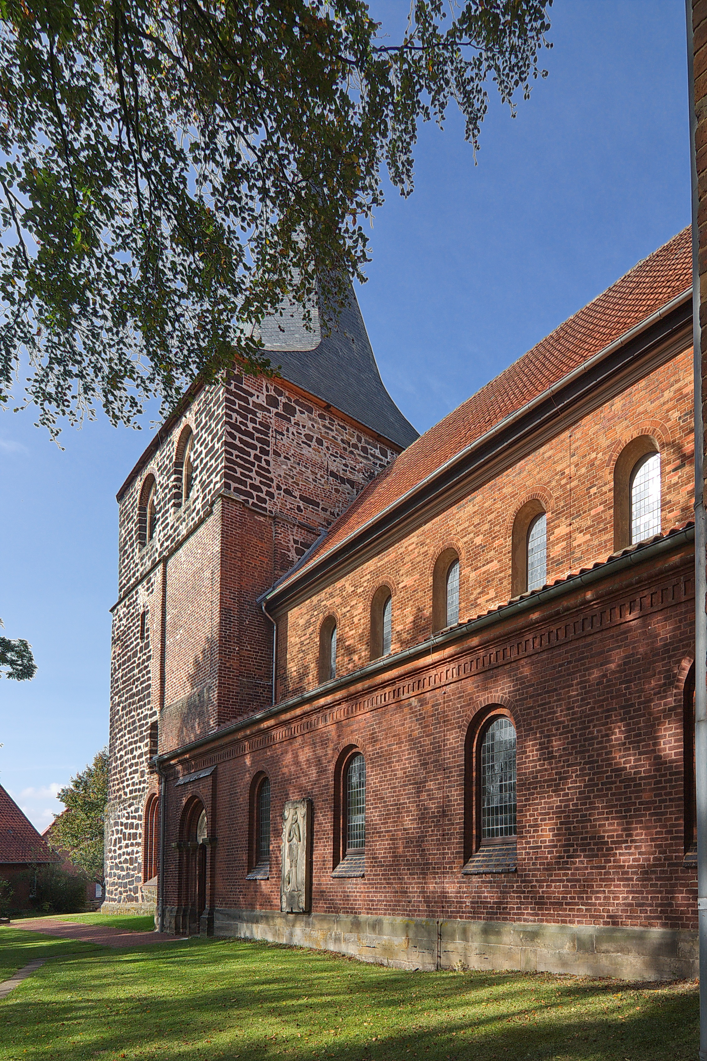 St. Osdag-Kirche in Mandelsloh (Neustadt am Rübenberge), Niedersachsen, Deutschland